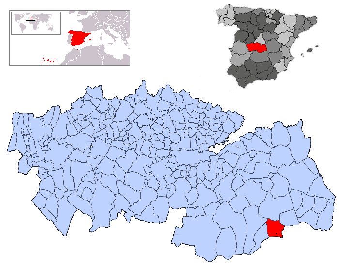 Villafranca de los Caballeros en la provincia de Toledo